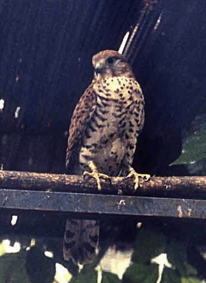 Crécerelle mauricien, Rivière Noire, Maurice